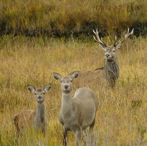 Red deer